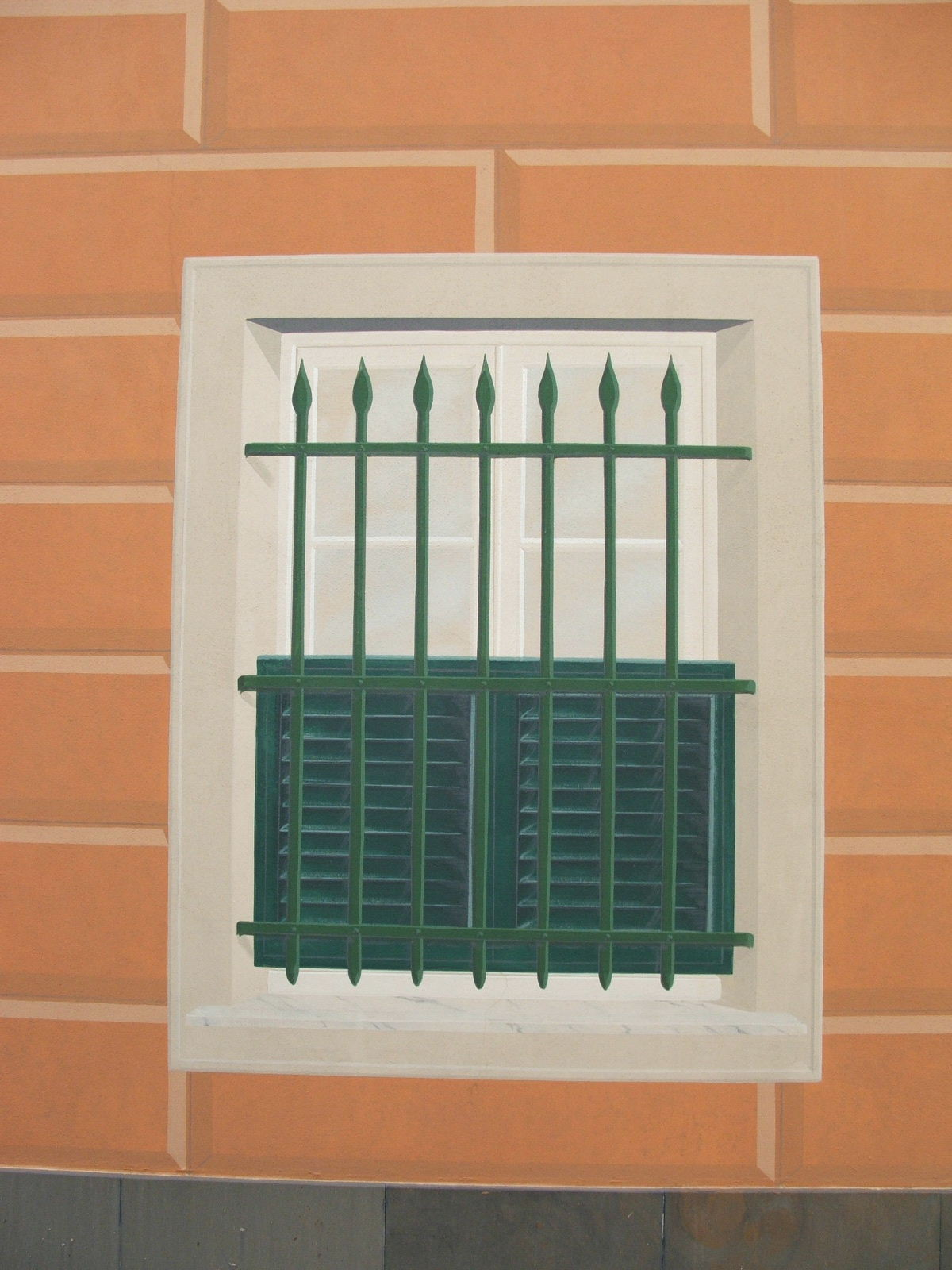 Genova, immagine dal quartiere di Albaro - esempio di Trompe l'oeil sulla facciata di una palazzina